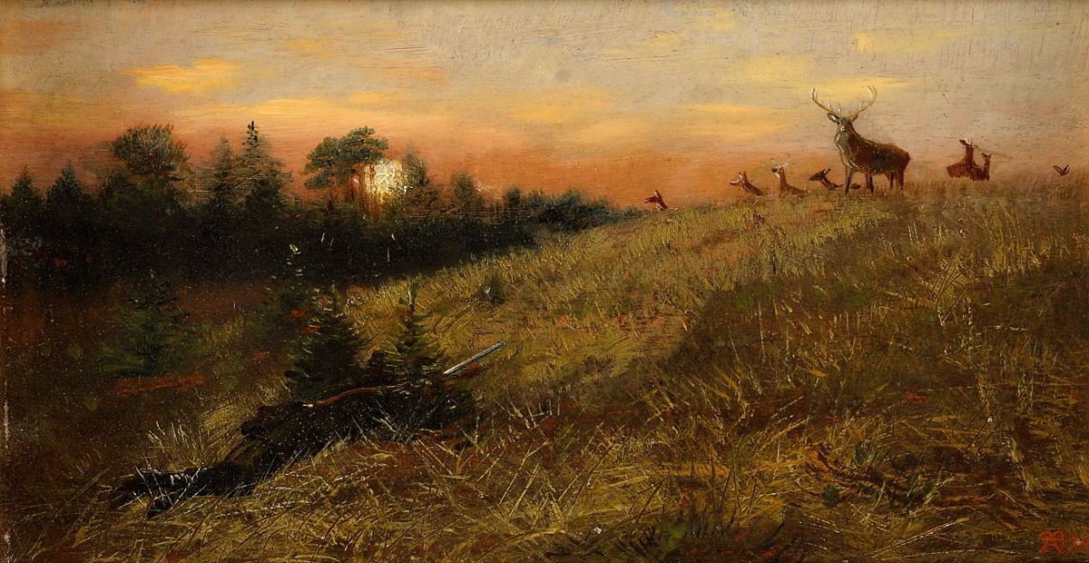 Jäger im Anschlag. Monogrammiert. Öl auf Holz, 11,5 x 21,5 cm.